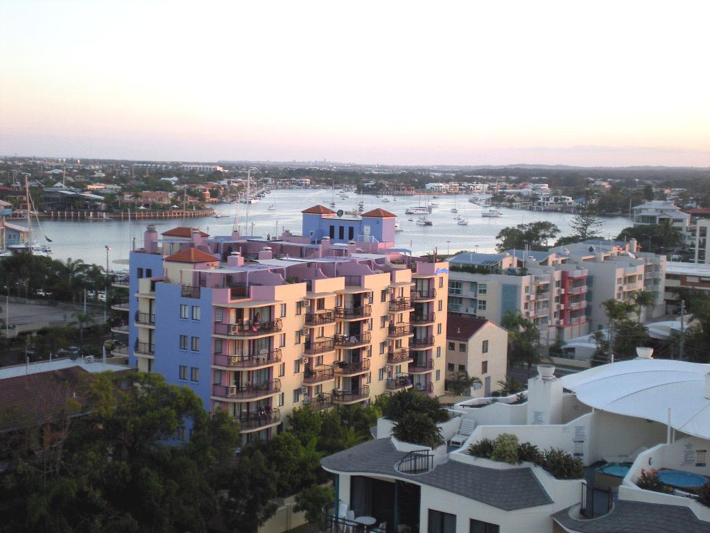 Mooloolaba, Queensland